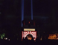 Installazione di luce di Fabrizio Crisafulli a Ponte Milvio file fornito da Fabrizio Crisafulli, autore della fotografia e dell'installazione stessa creazione della foto: 27 settembre 2003 autore del file Fabrizio Crisafulli Fabrizio Crisafulli, detentore del copyright, concede la foto con licenza Creative Commons libera con attribuzione cc-by-1.0 nota: ho inoltrato all'indirizzo la mail con cui l'autore mi autorizza e sceglie la licenza